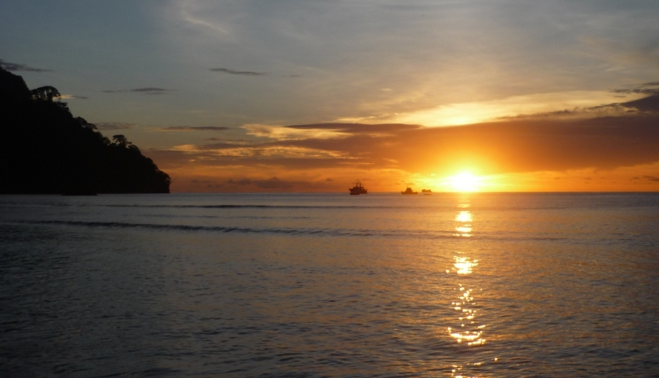 Atardecer en Bahía Wafer, Isla del Coco, 2010